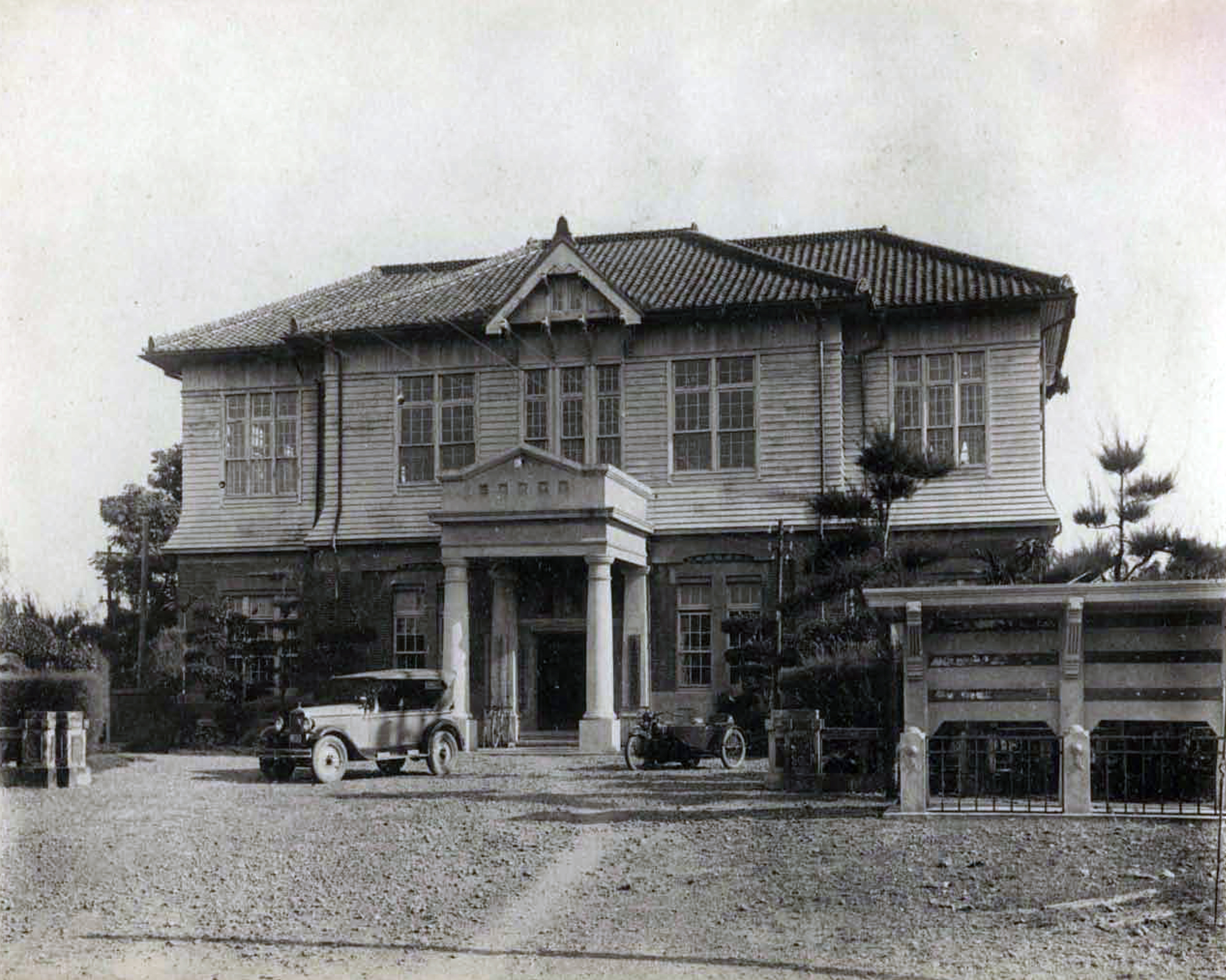 新化郡役所，翻拍自1929年版的《新化郡概況》。